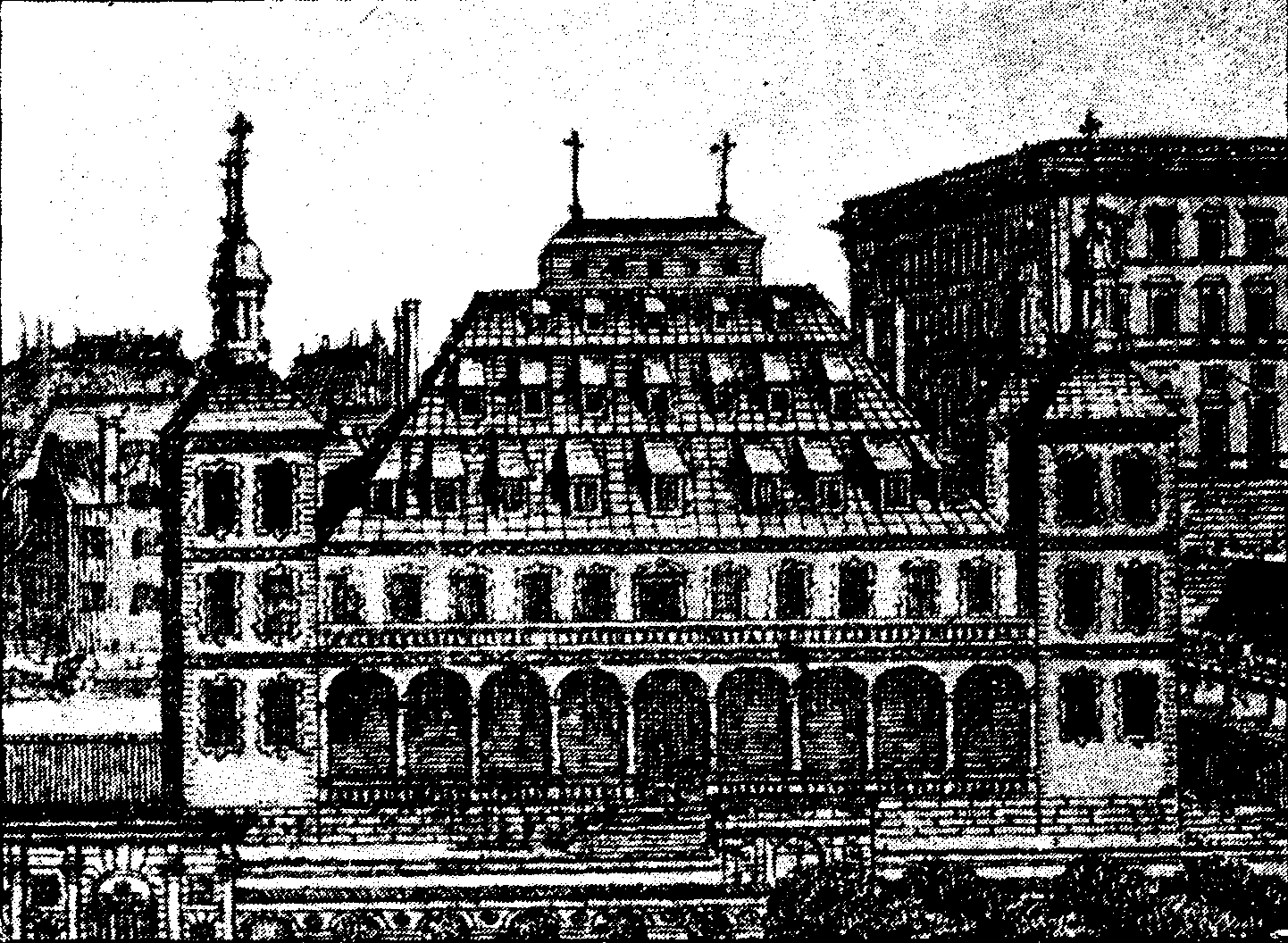 De la Gardie palace, Stockholm